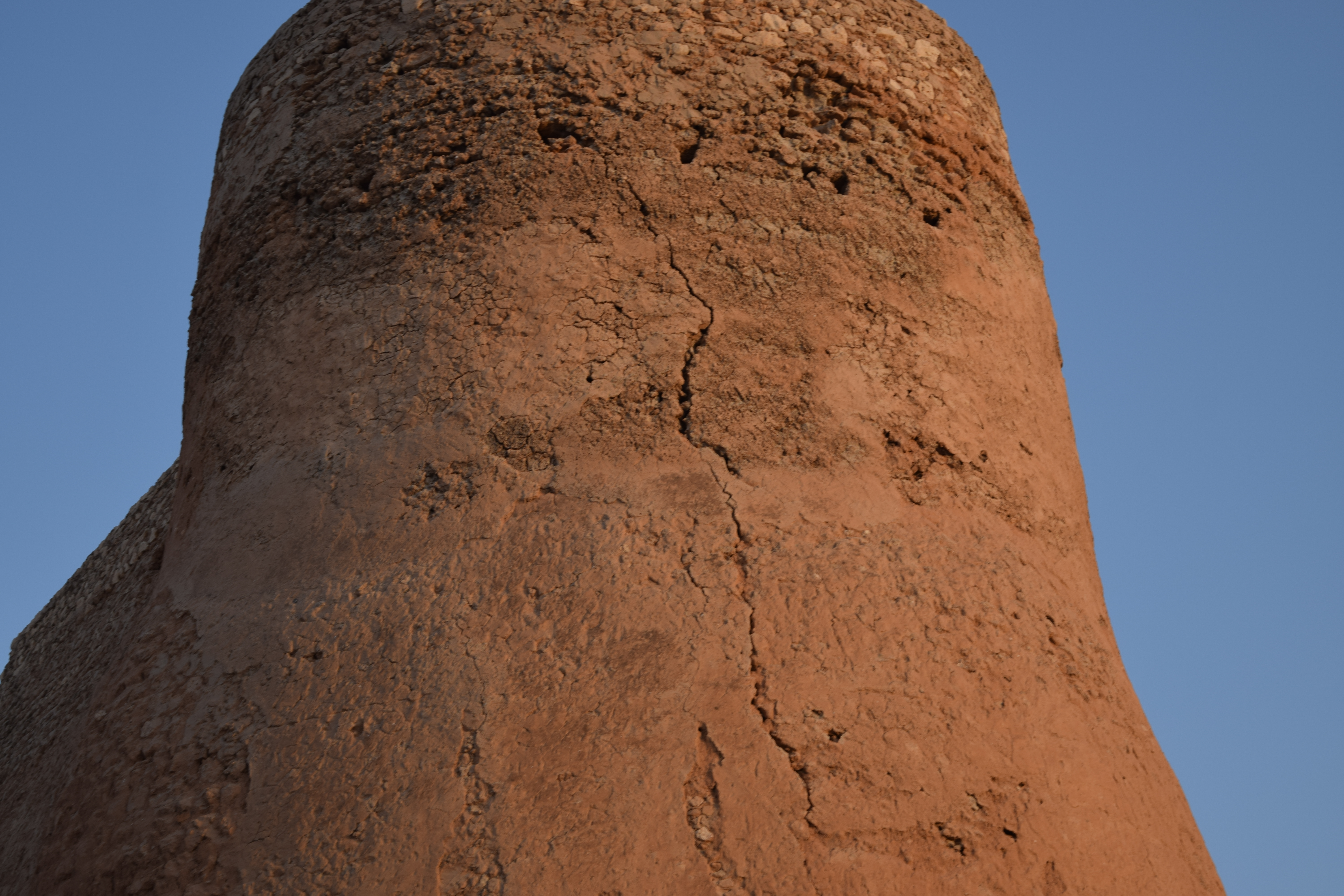 صورة توضح جانب من الإهمال وتصدع برج قلعة تاروت